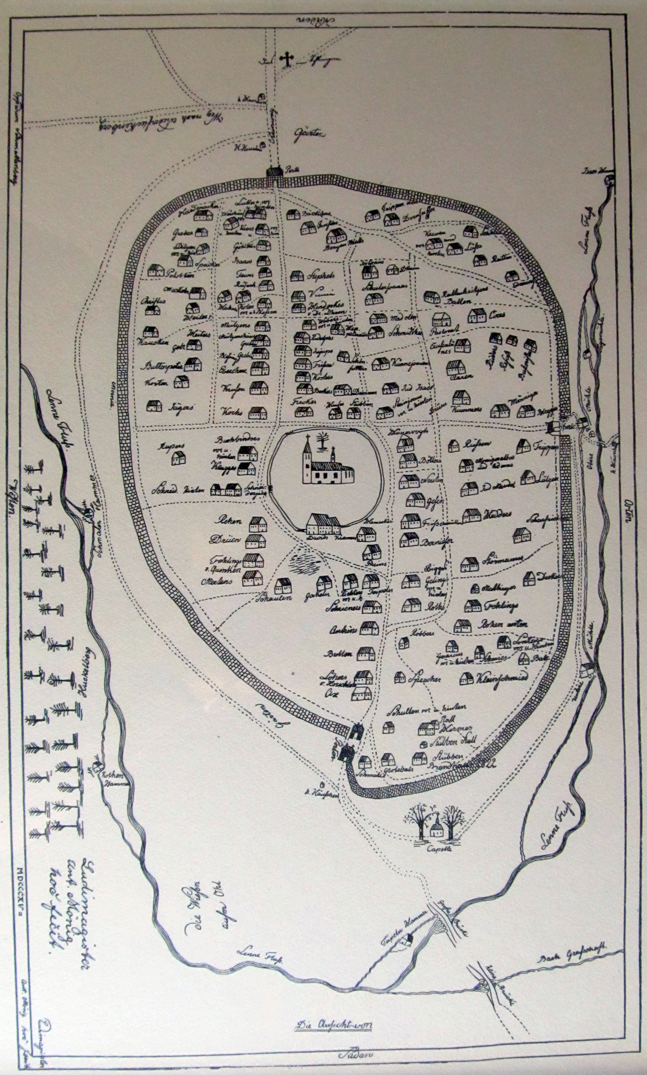 Schmallenberg (1815) , Germany.